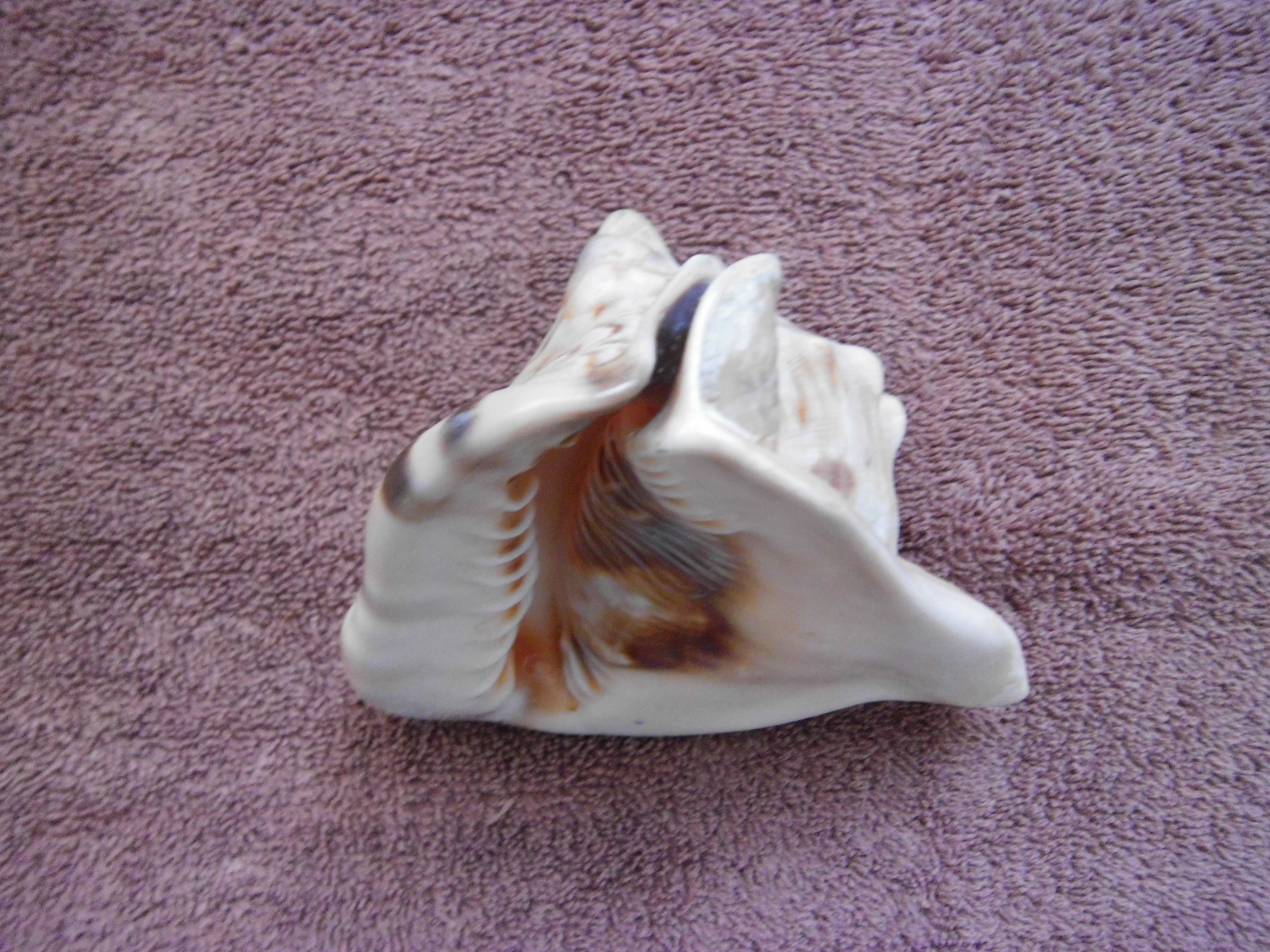 Cassis tuberosa (Linnaeus, 1758) colectado en Isla La Orchila, Dependencias Federales - Venezuela